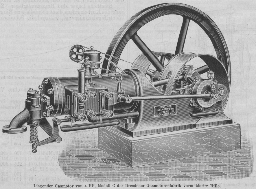 Liegender Gasmotor von 4 HP, Modell C der Dresdener Gasmotorenfabrik vorm. Moritz Hille